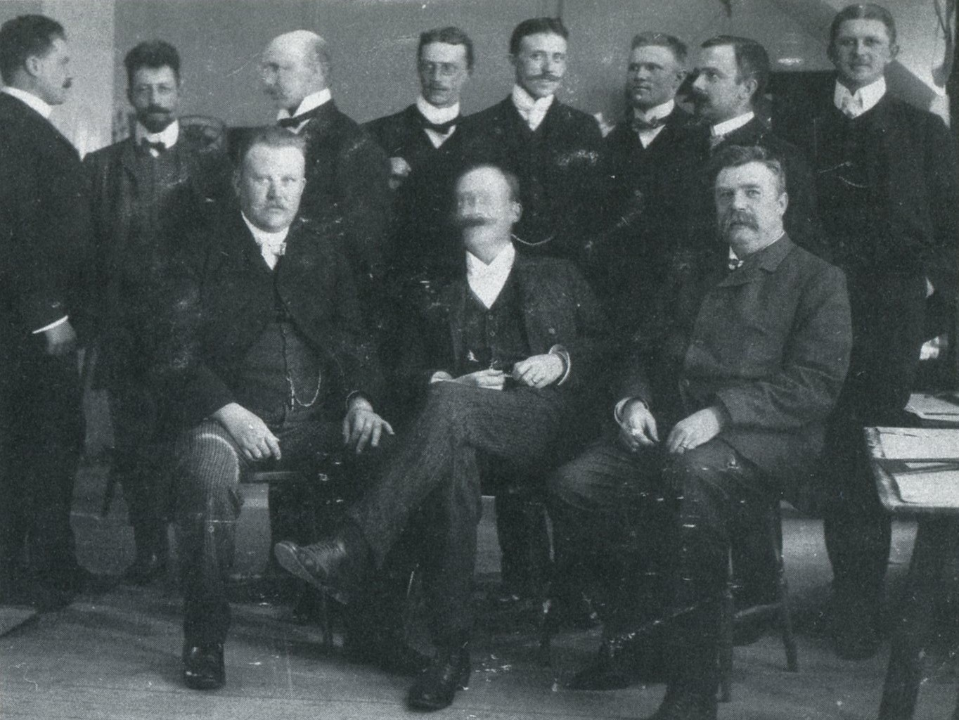 Arkitektkontoret "Dorph & Höög". Stående längs till höger: Gunnar Morrsing, sittande till höger: Anders Höög, i mitten sittande (oskarp): Victor Dorph